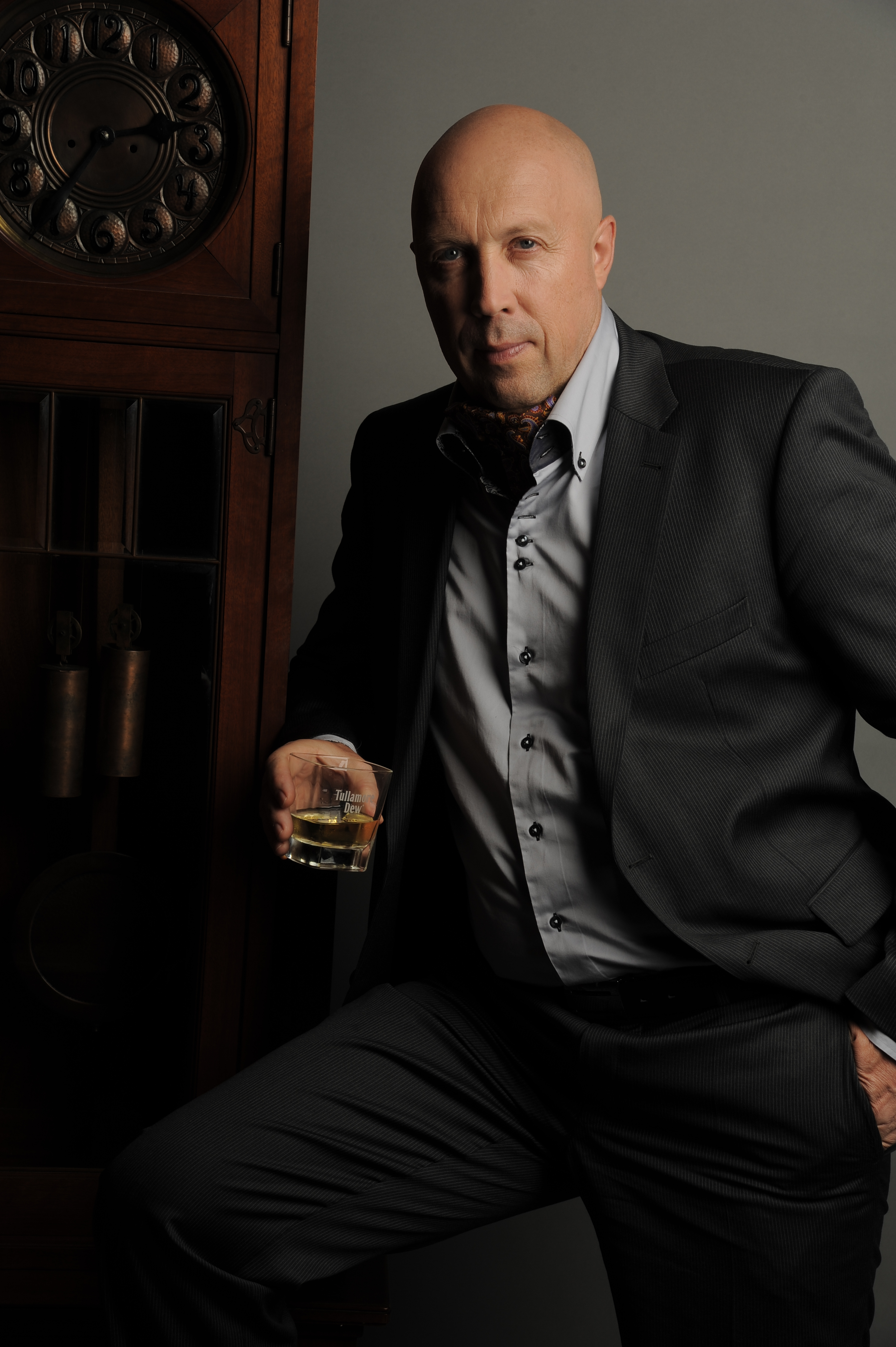 Oldřich Lomecký